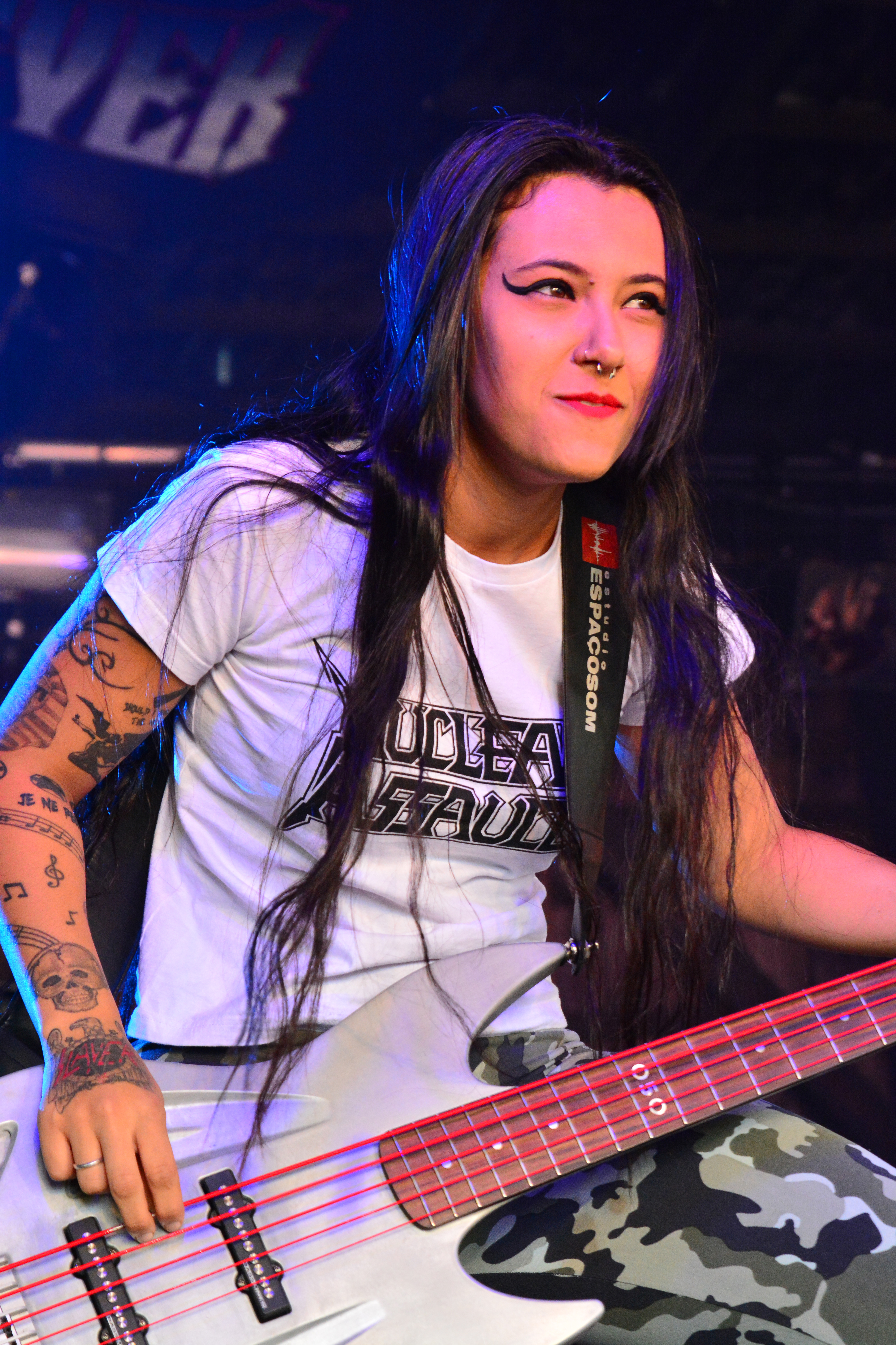 Nervosa beim Headbangers Open Air 2015